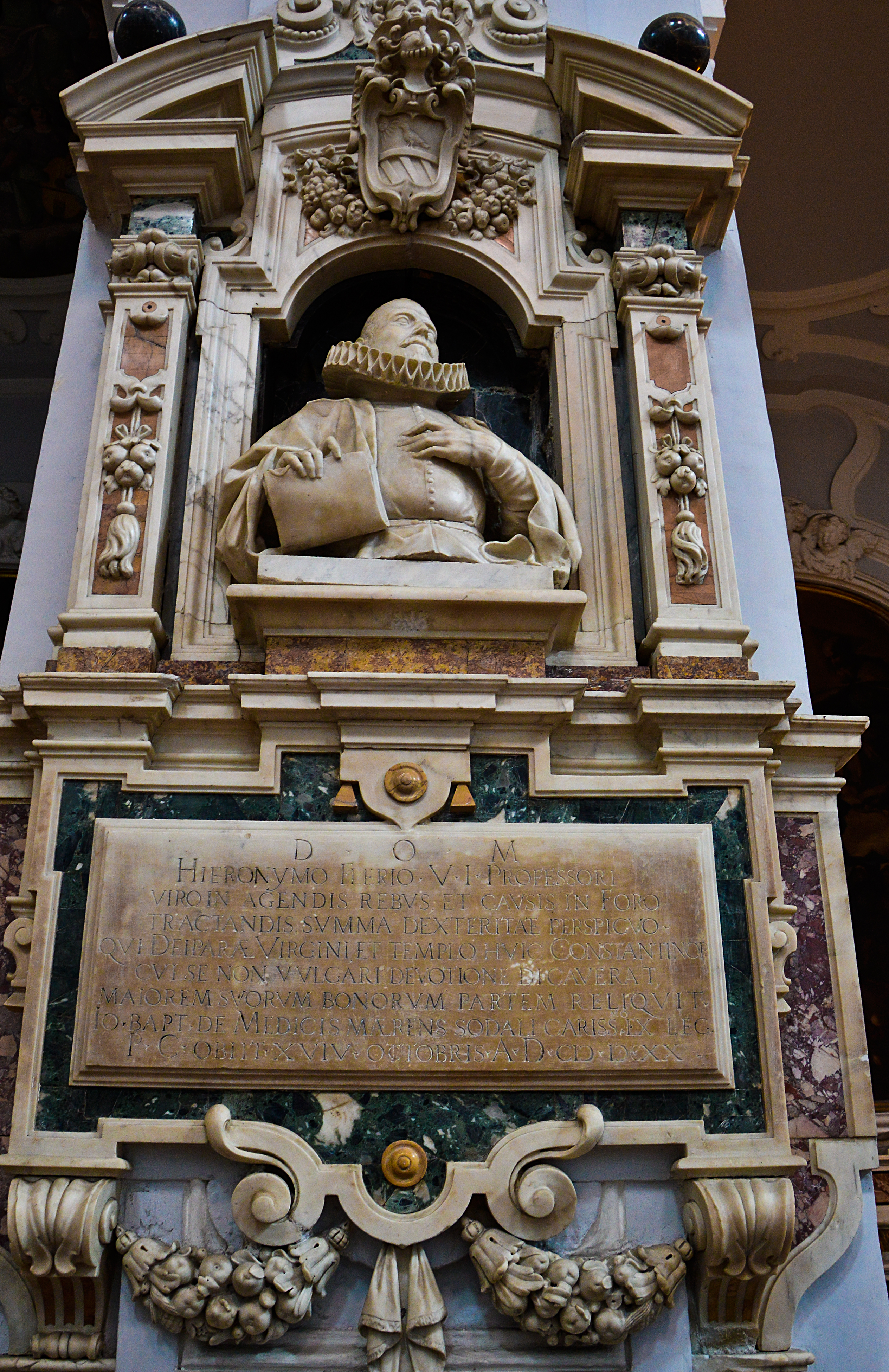 Cenotaffio a Gerolamo Flerio, 1620.